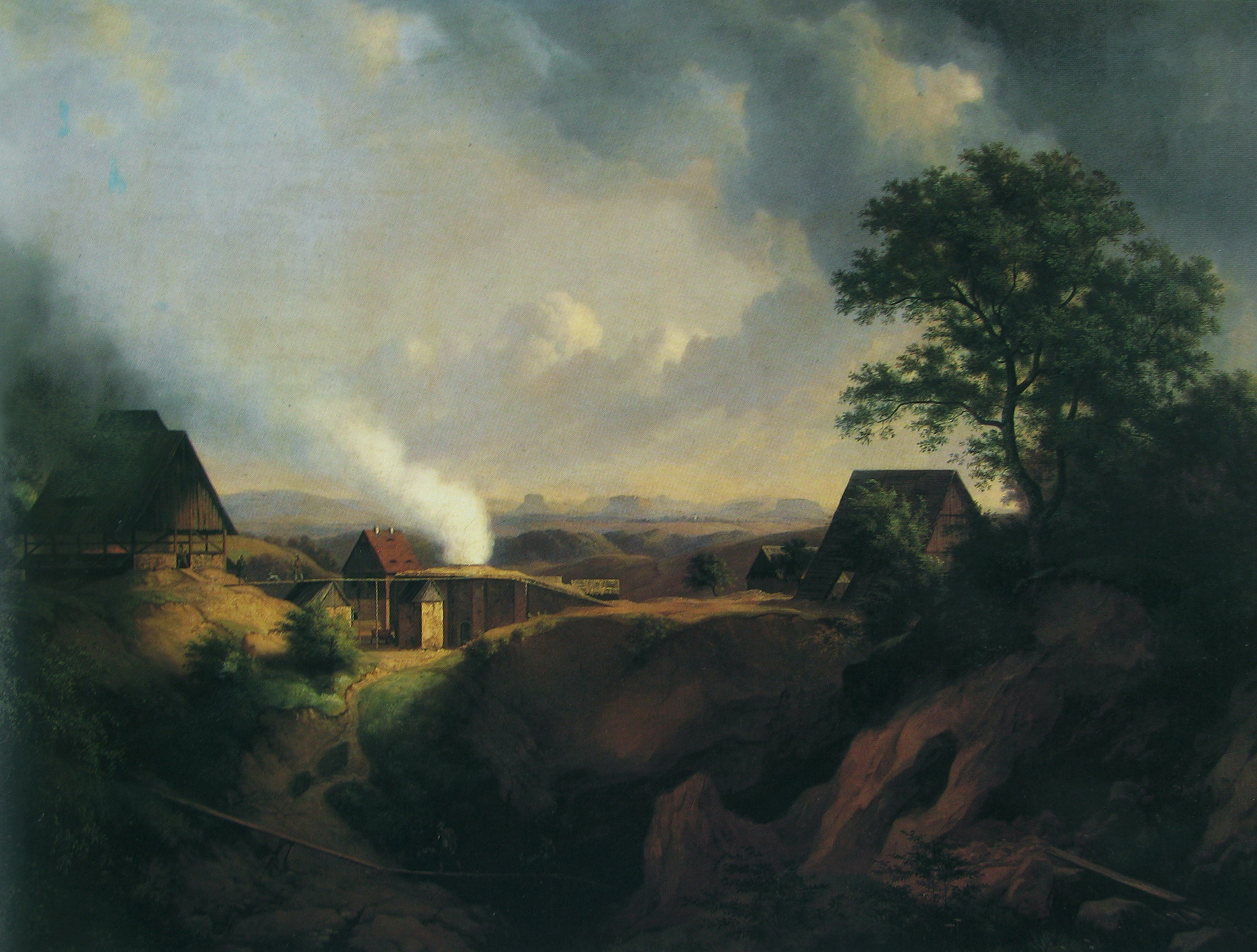 Landschaft bei Maxen, einem Dorf nahe Dresden/Deutschland